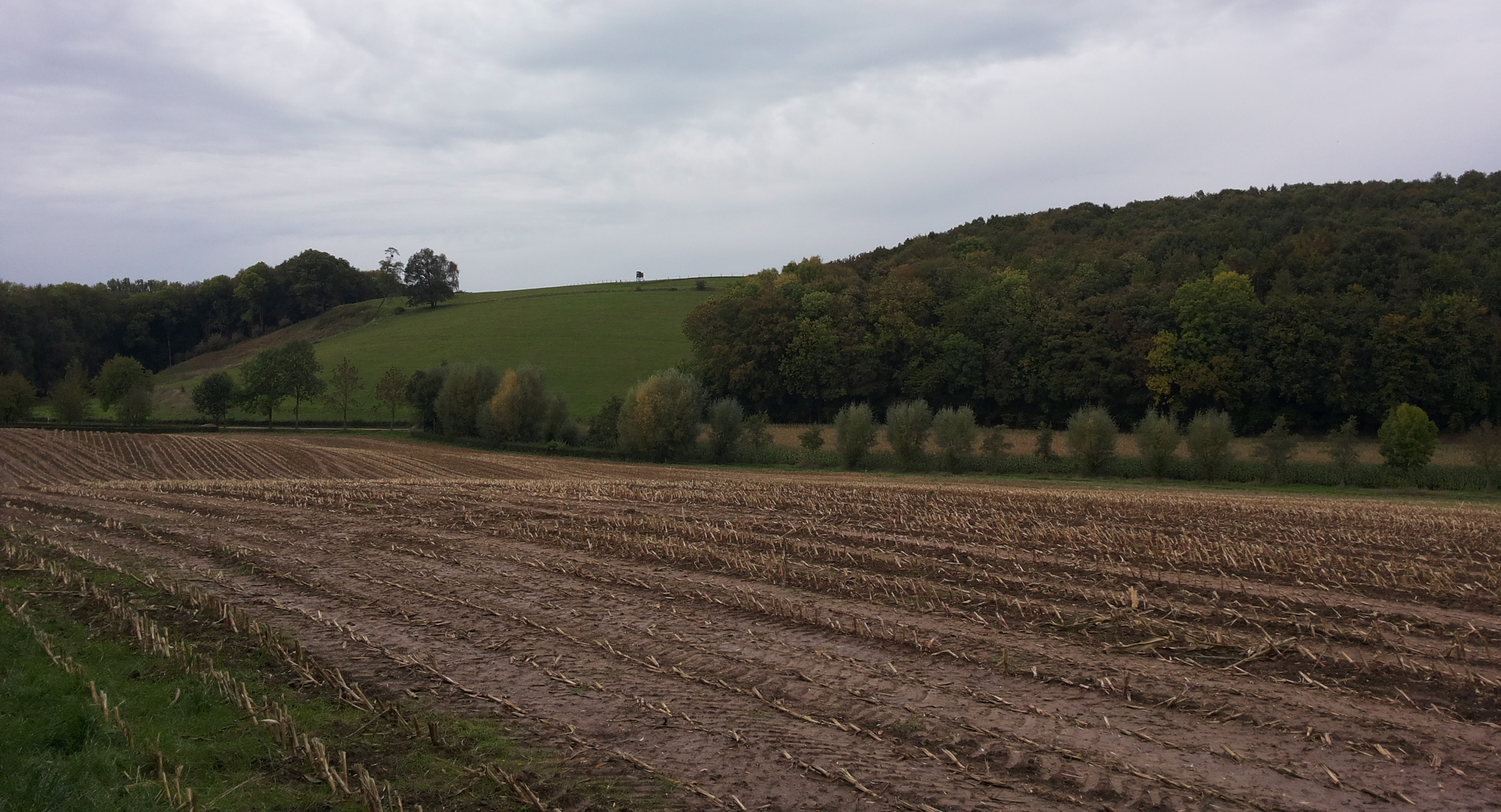 Helling langs weg Euverem-Reijmerstok, Limburg, Nederland